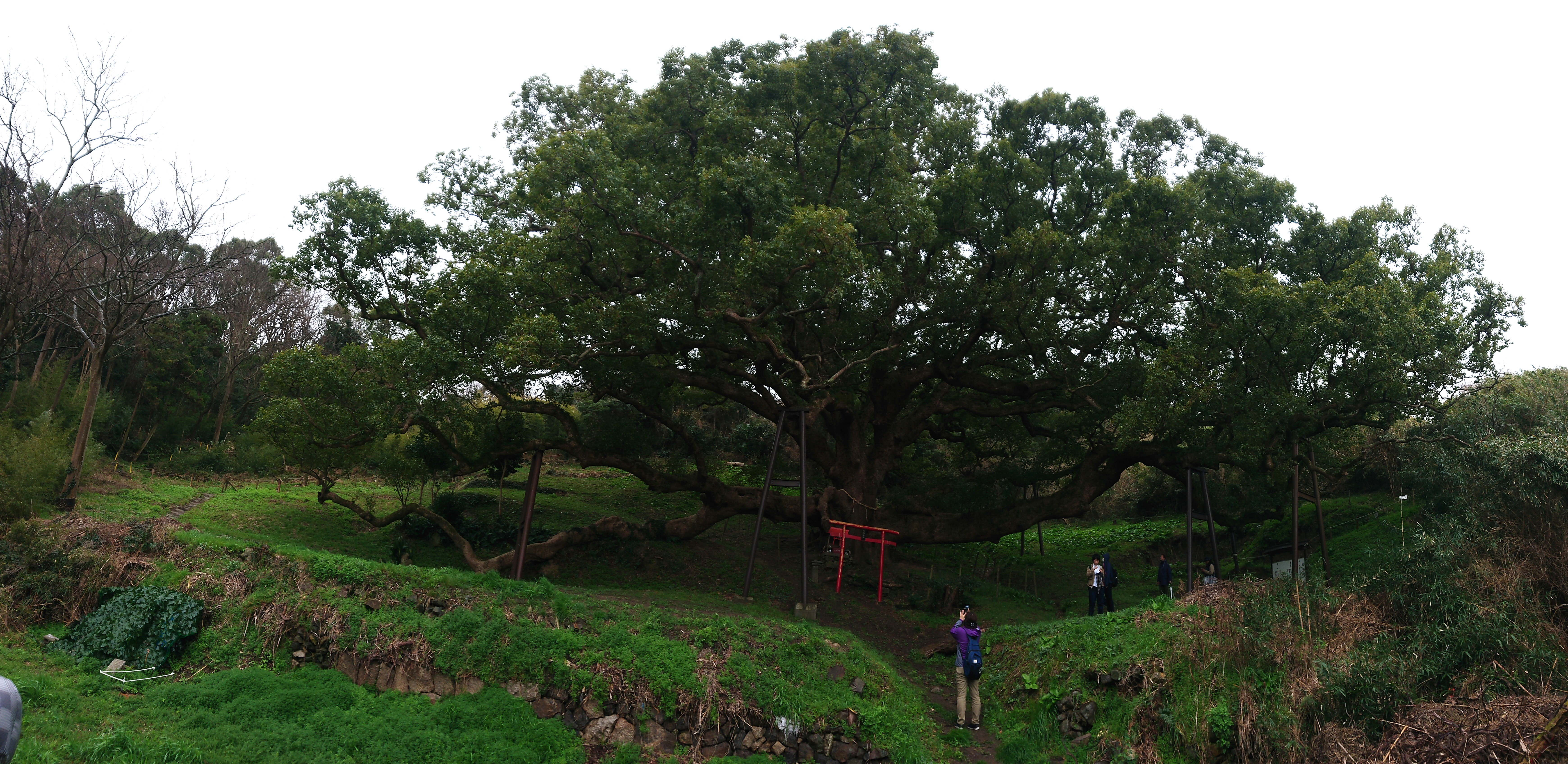 香川県三豊市詫間町志々島